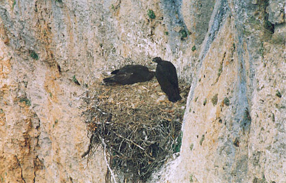 Paisaje del Monumento Natural de La Fuentona